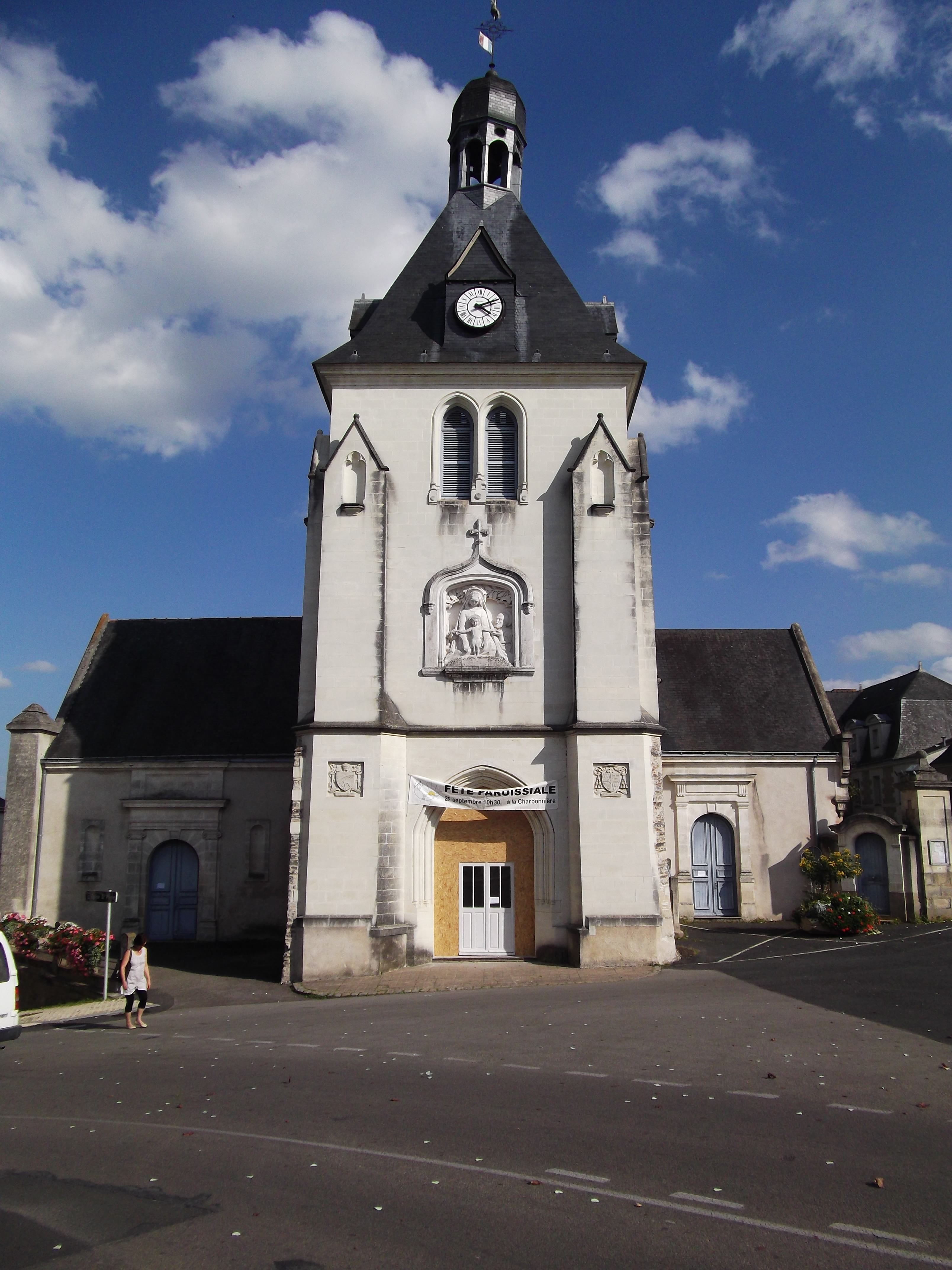 Façade principale de l'église Saint-Pierre d'Ancenis (44).